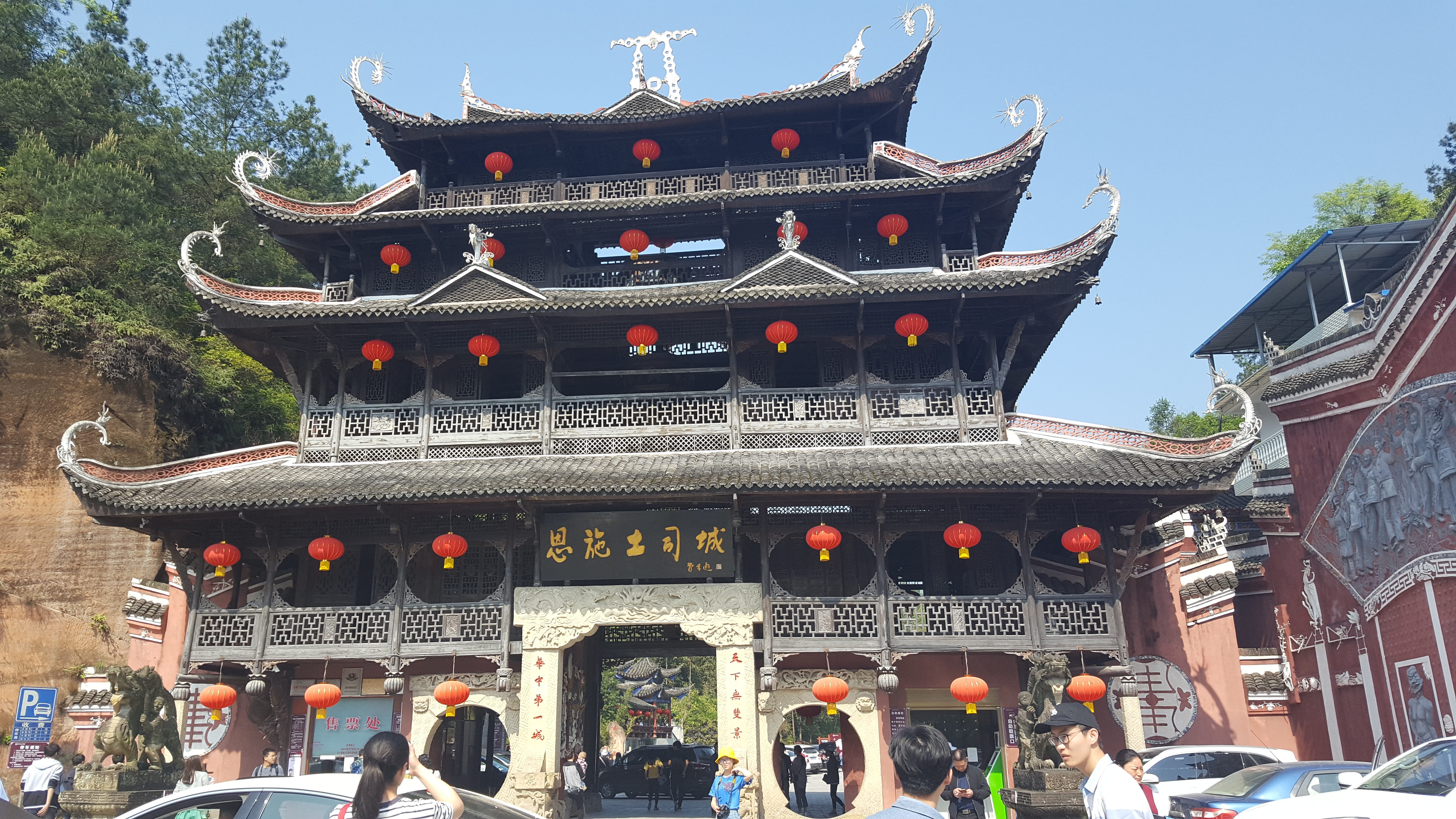 中文（中国大陆）: 恩施土司城